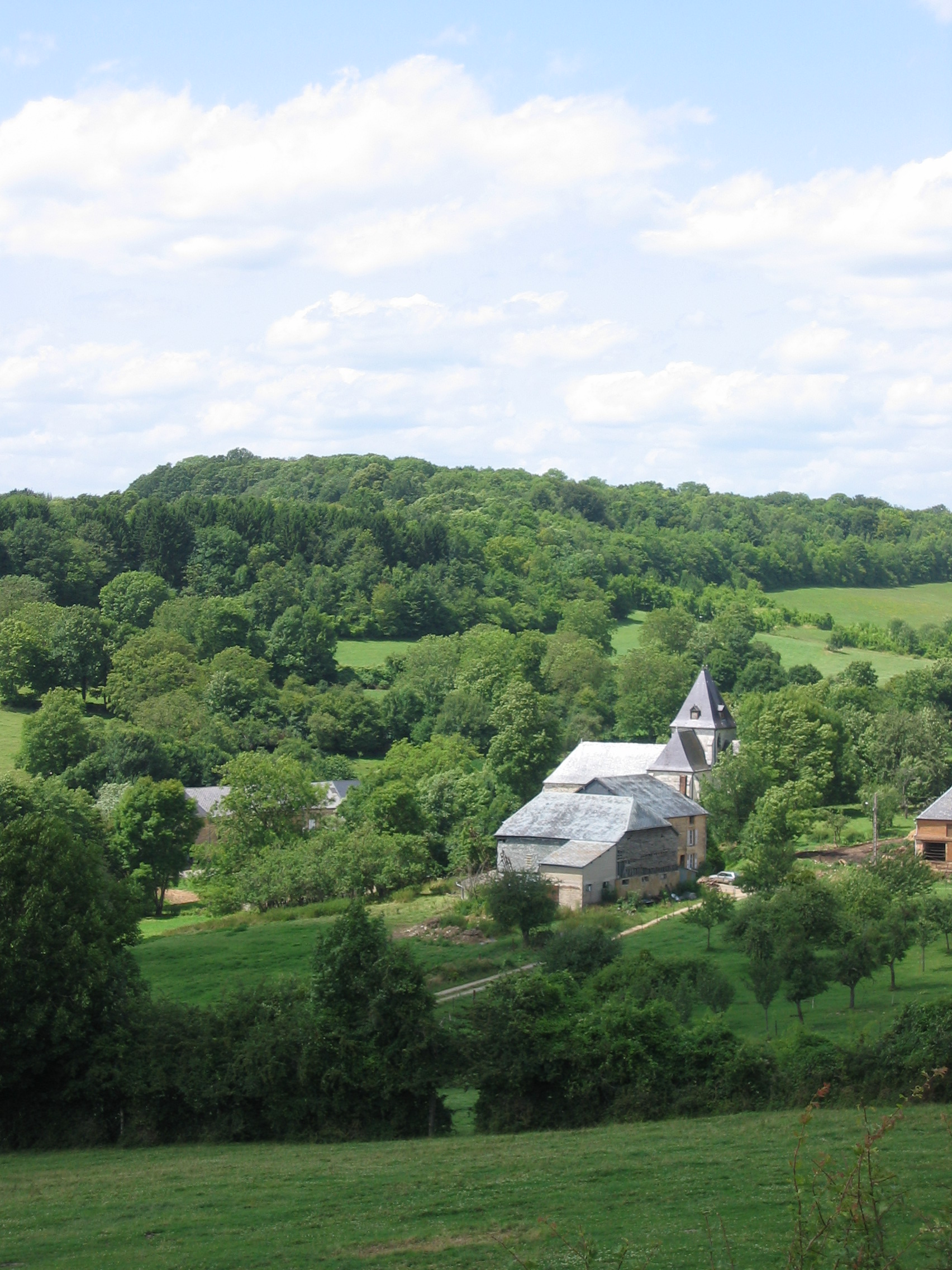 Eglise St Claire d'Hagnicourt vue 2 en Ardennes (France)